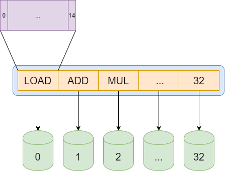 milli arhitektuuri toru